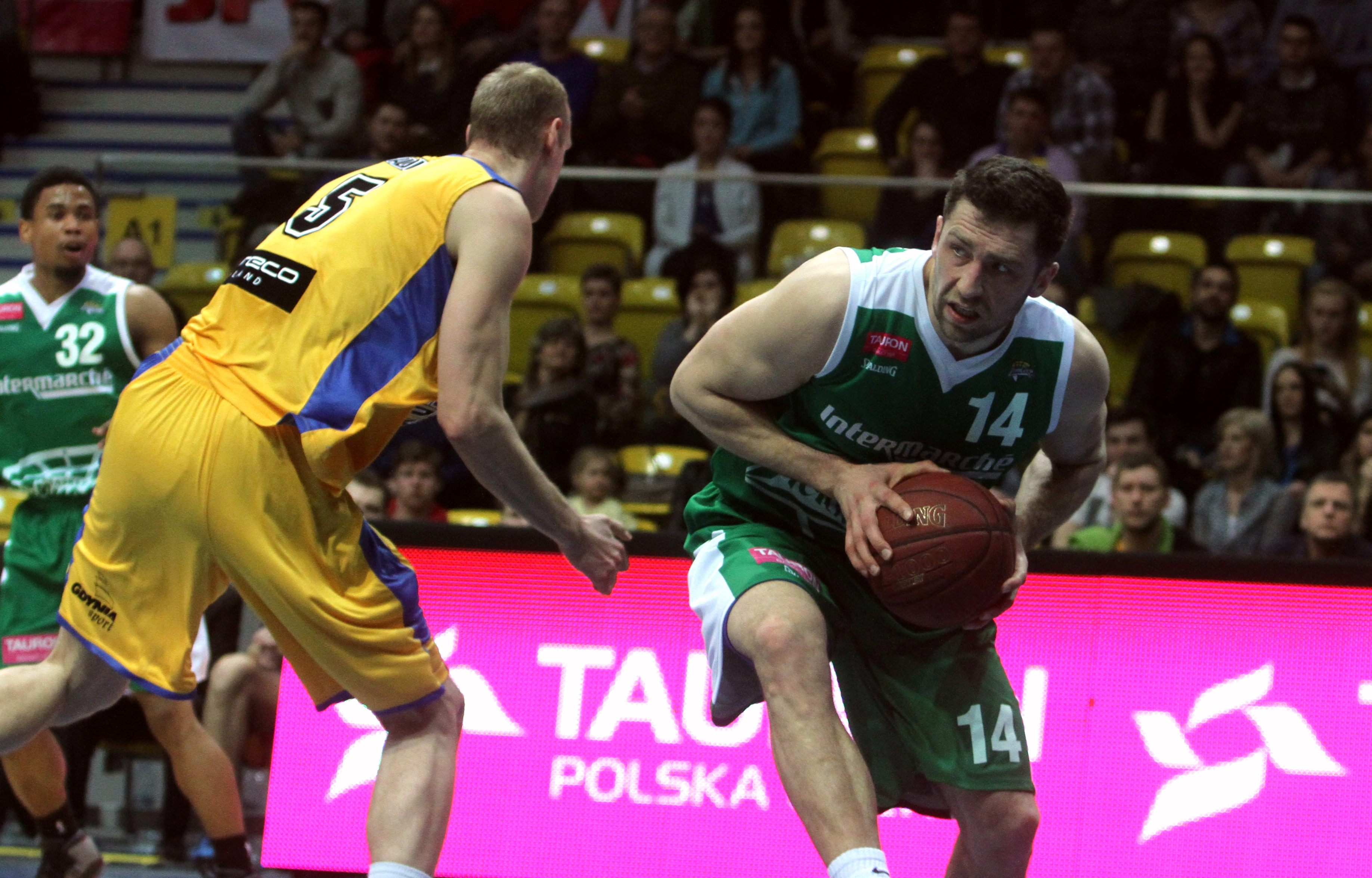 Adam Hrycaniuk Stelmet Zielona Góra